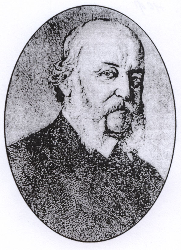 Феликс Каниц